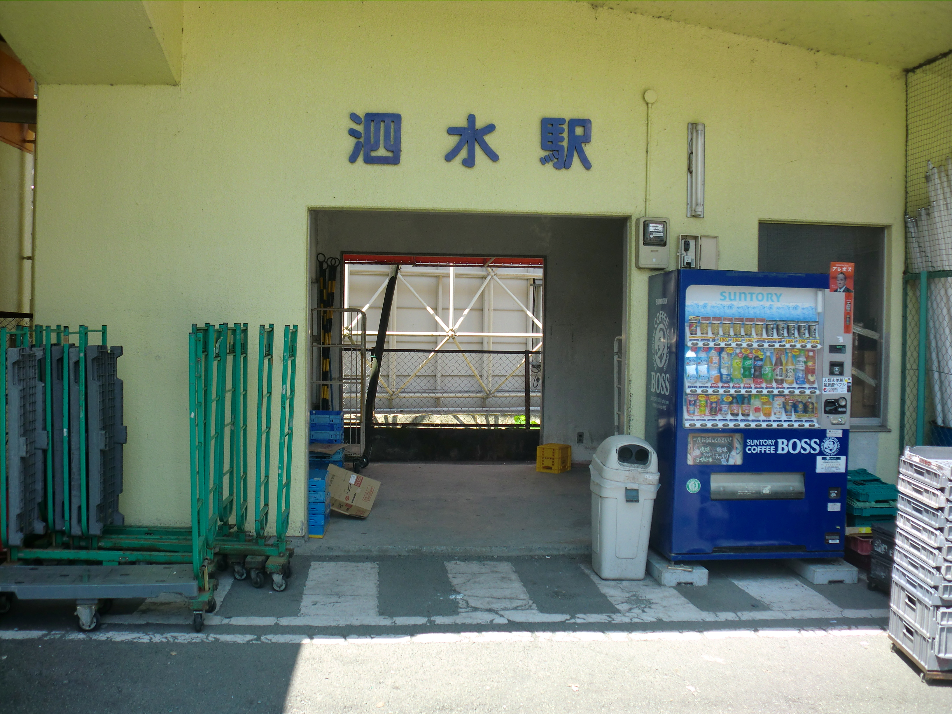 熊本電鉄泗水駅